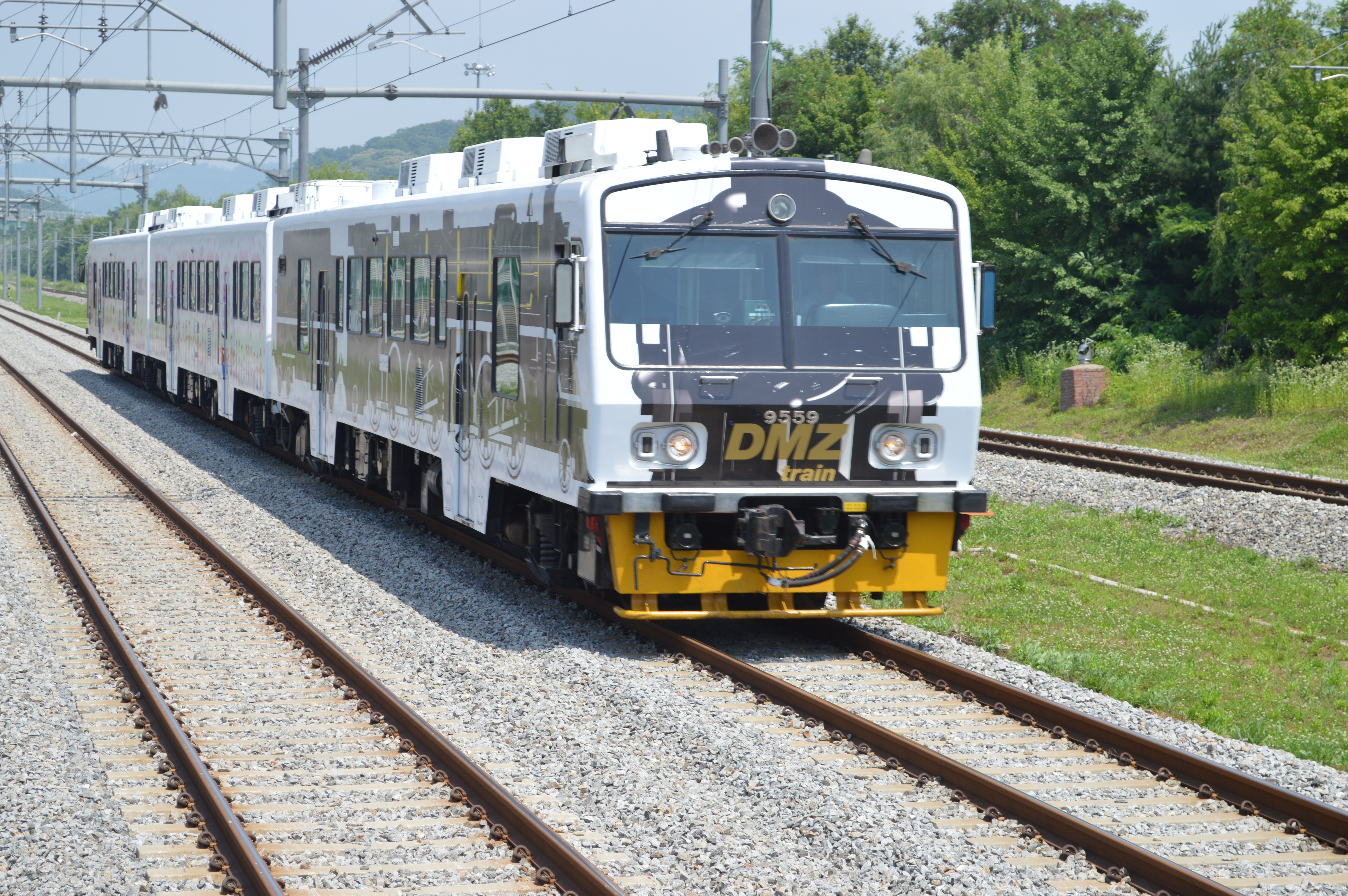 행신역을 통과하는 평화열차